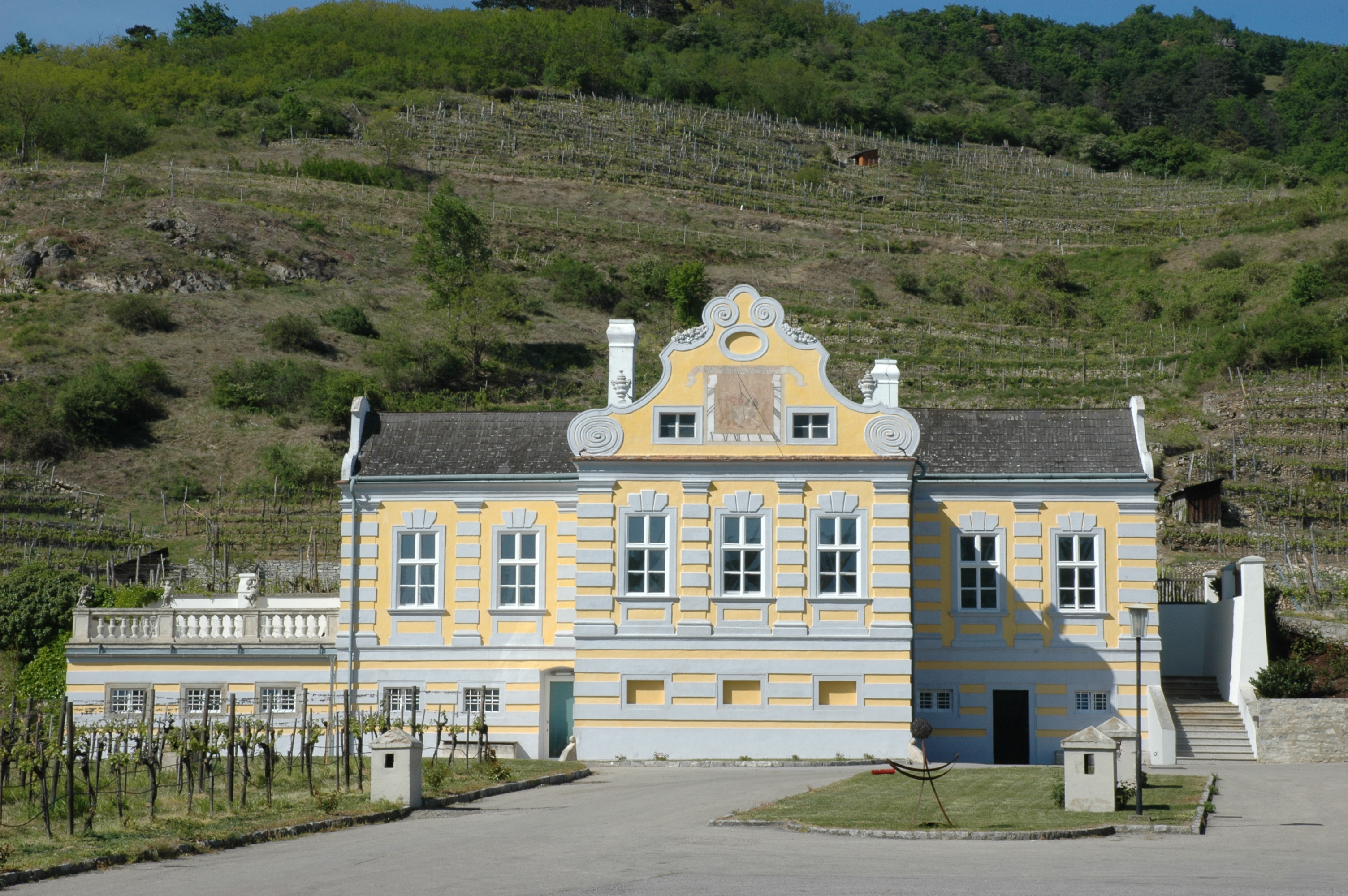 Weinschlössl in Dürnstein/Wachau